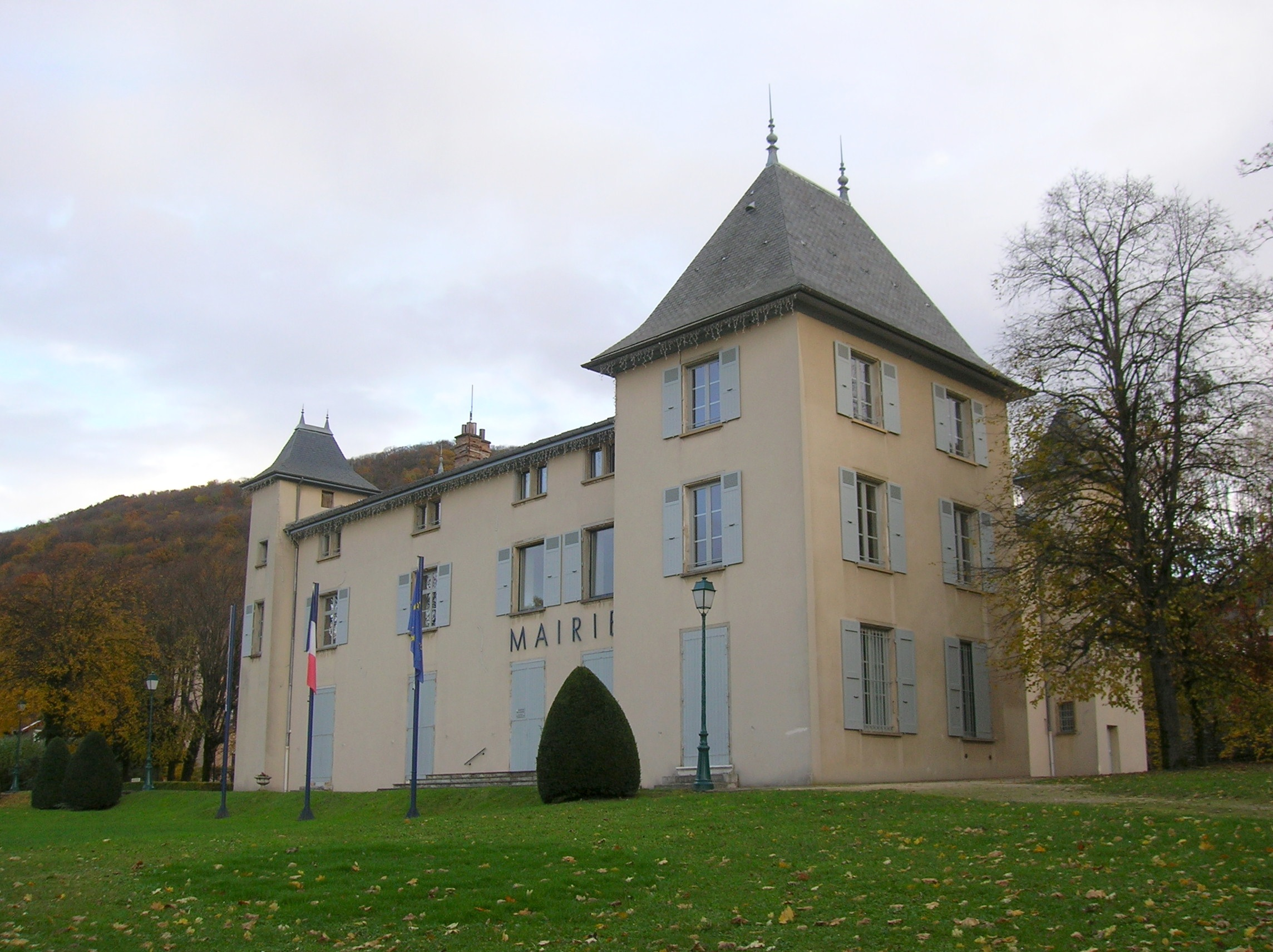 mairie de Bresson, Isère, France.